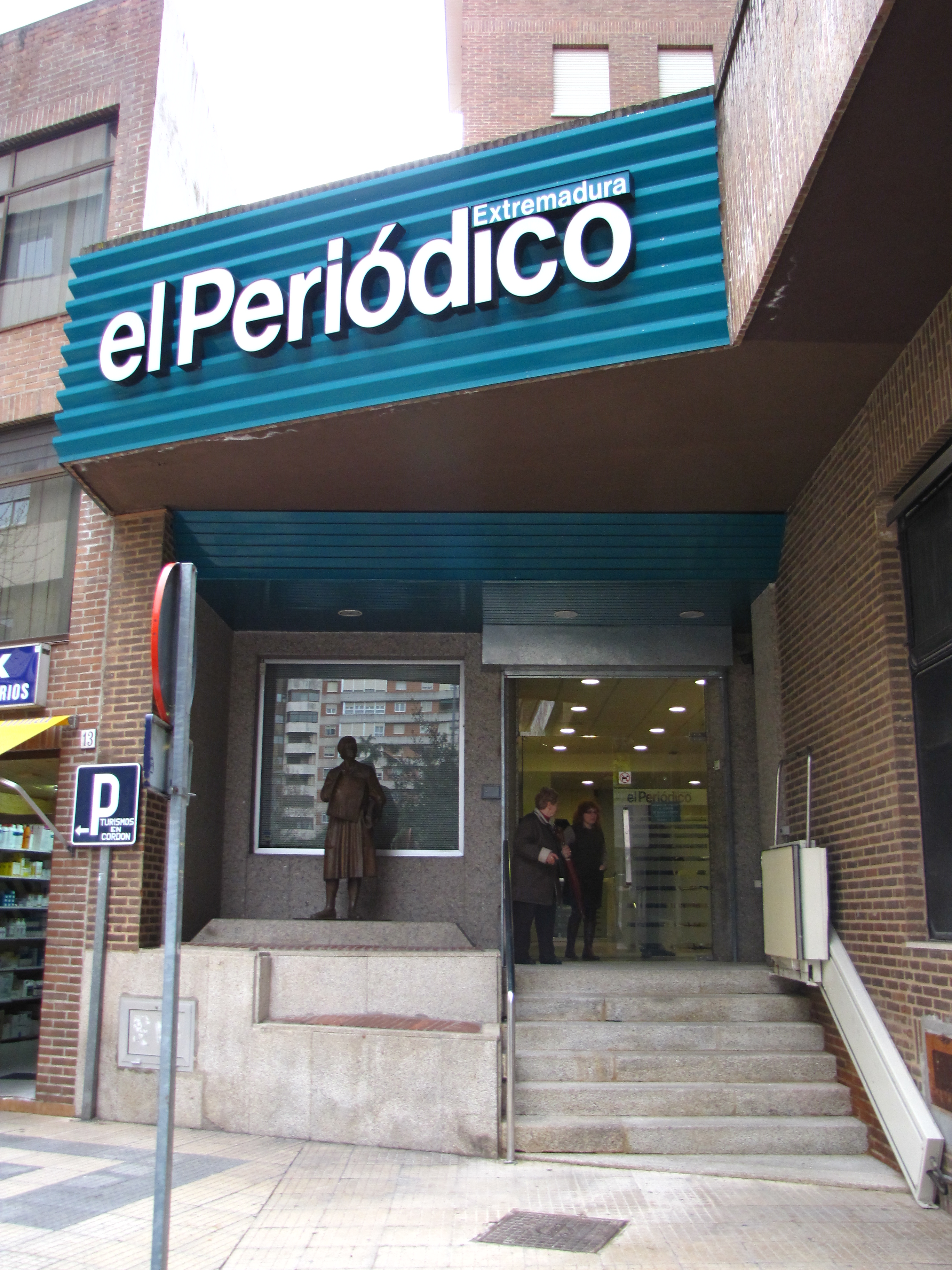 Fachada principal de las oficinas centrales de El Periódico en la ciudad de Cáceres